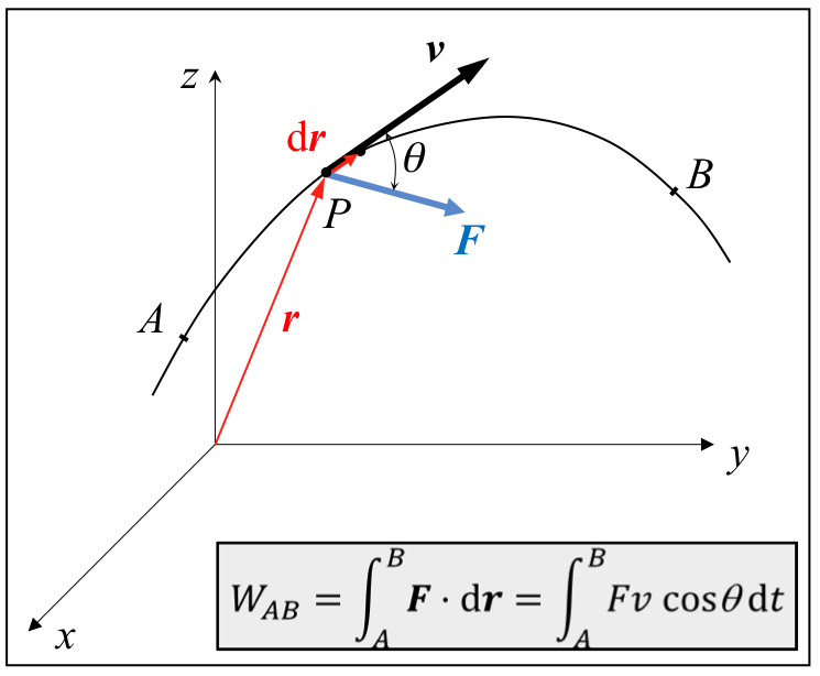 Indar-eremu batean higitzen ari den partikularen ibilbideko bi punturen artean indarrak eginiko lanaren definiziorako elementuen grafikoa